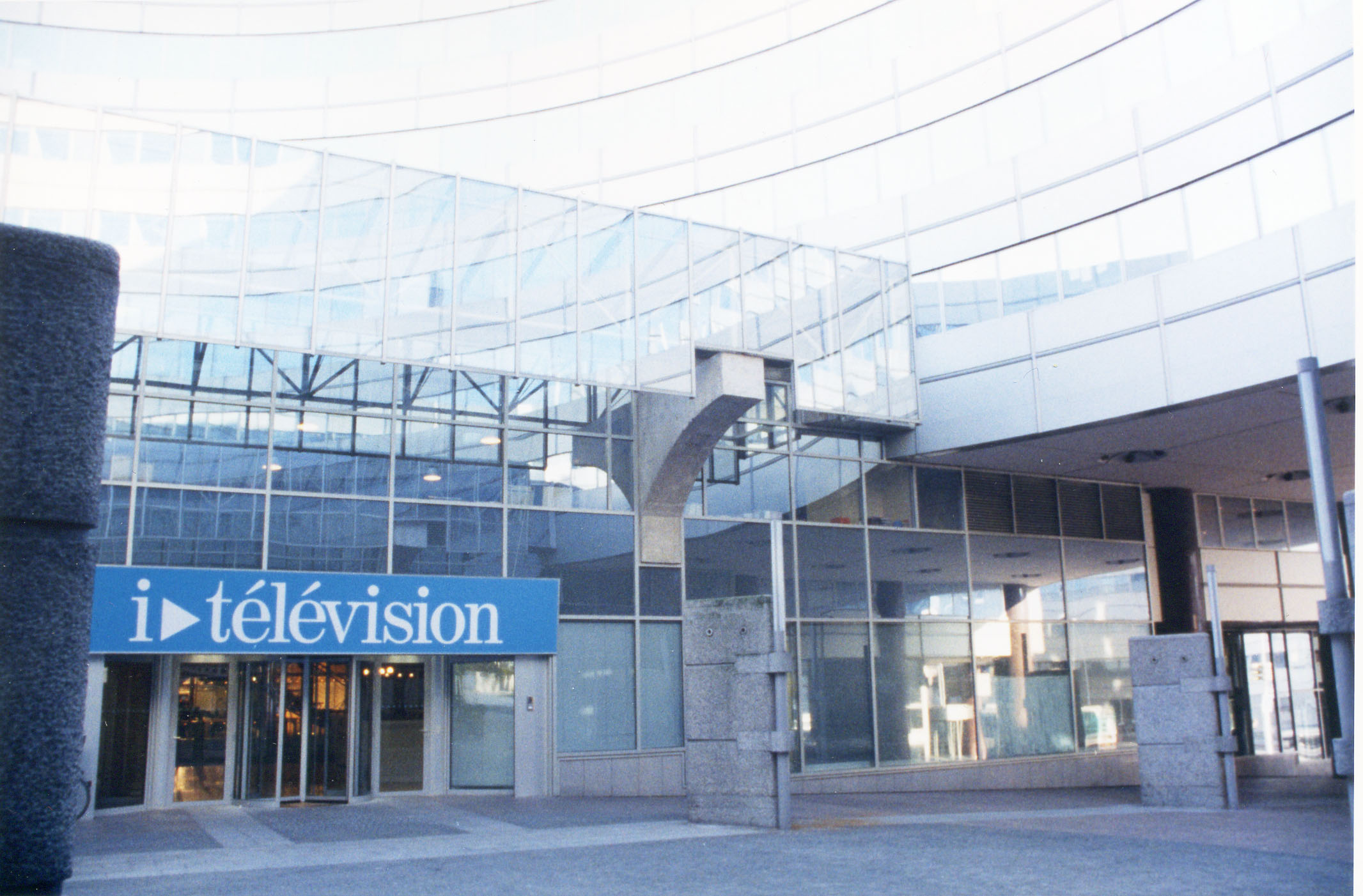 Les locaux de la chaîne d'information itélé (alors intitulée i-télévision) een 1999.